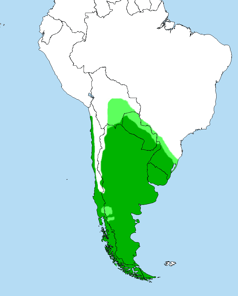 Milvago chimango - Distribution